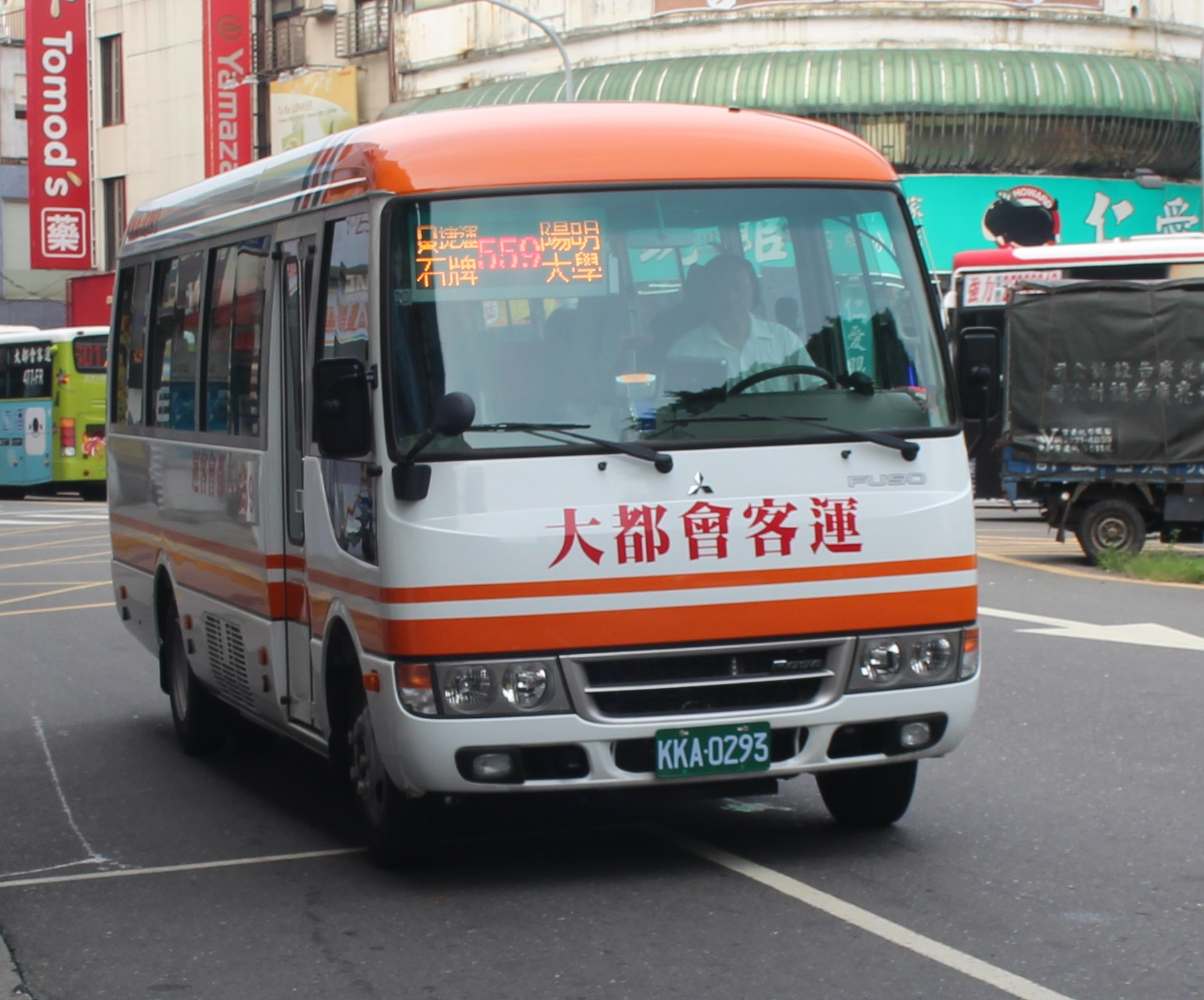 大都會客運三菱扶桑Rosa中型巴士KKA-0293